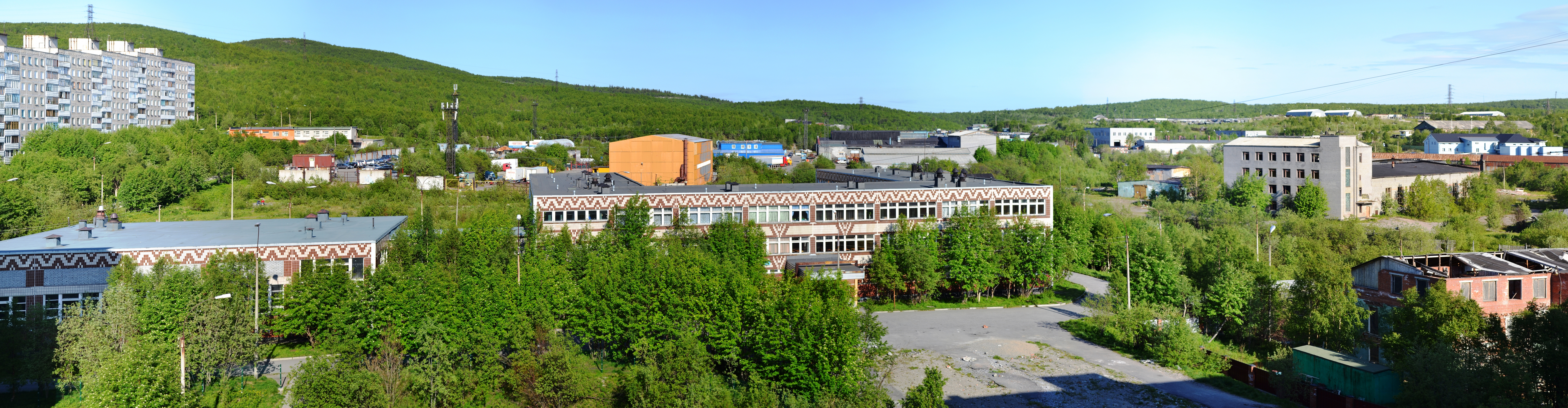 13 школа. 2011 г.